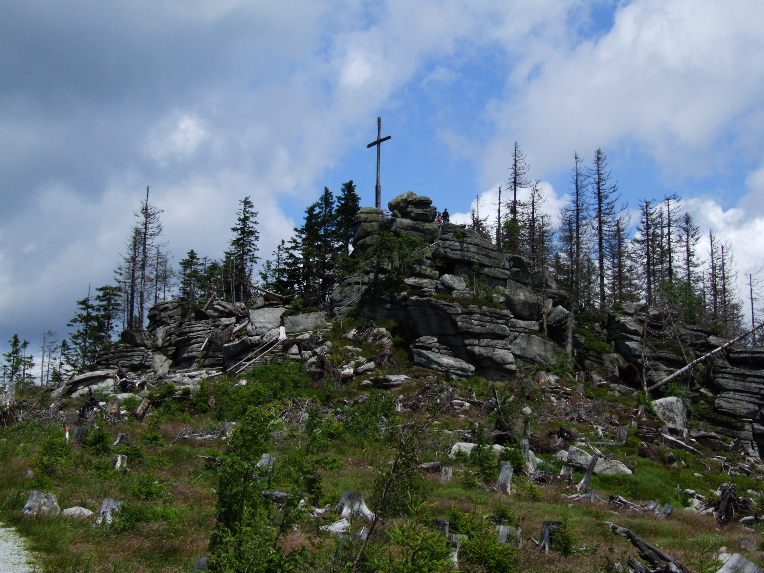 Dreisesselberg (Třístoličník), Böhmerwald (Šumava) - Hochstein